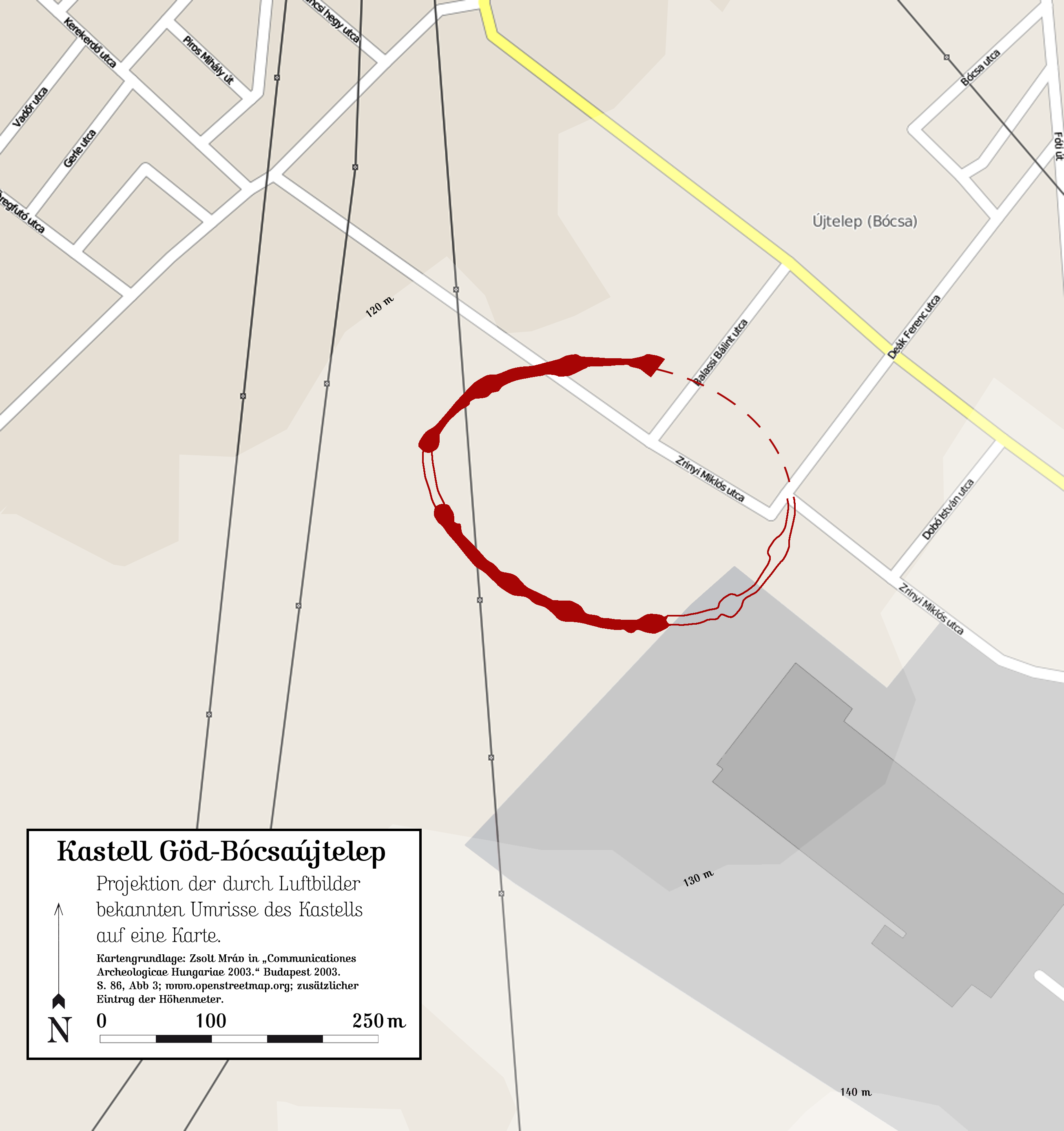 Luftbildprojektion der Umrisse des Kastells Göd-Bócsaújtelep in Nordungarn auf eine Karte.